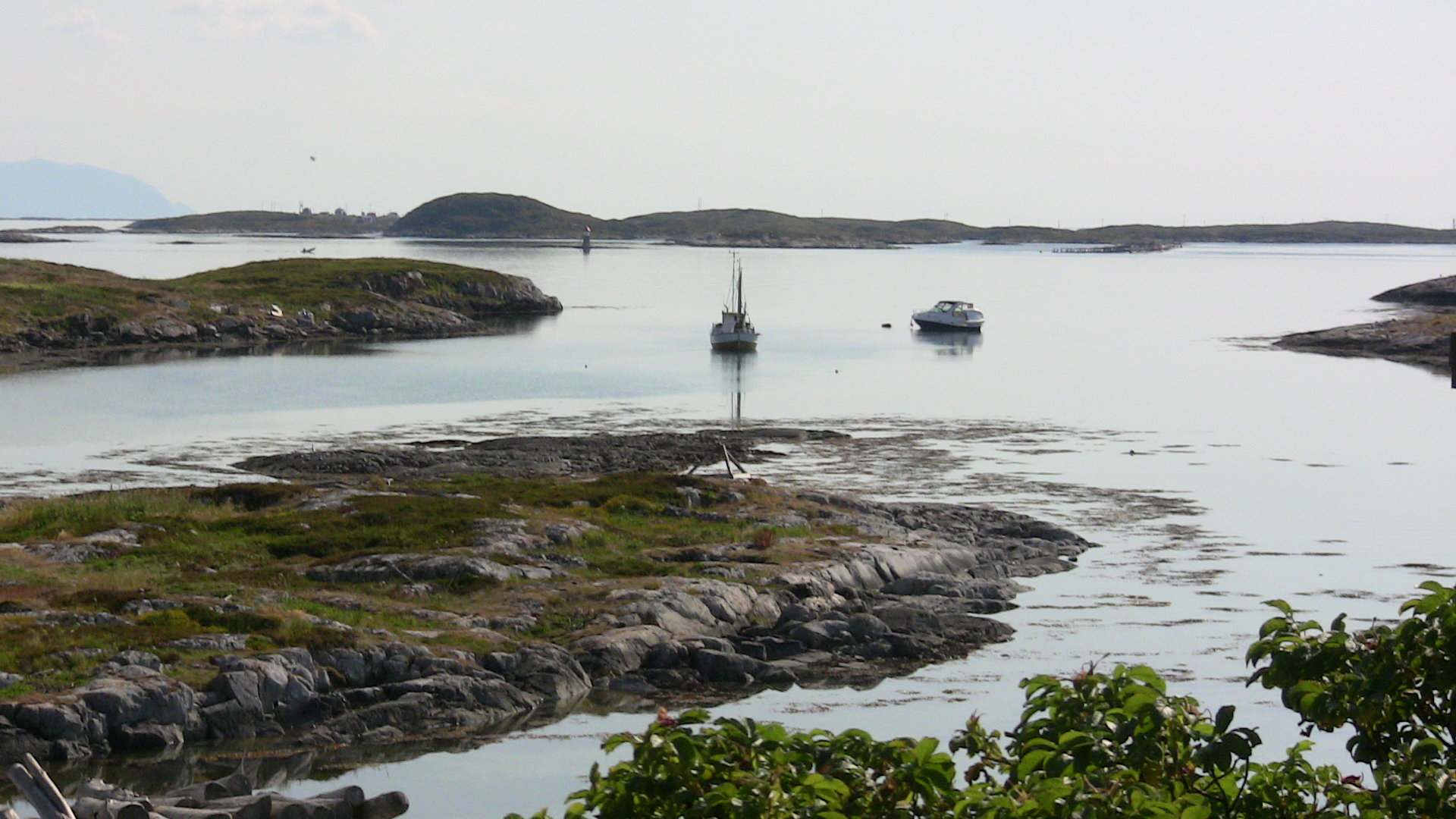 Gåsvær